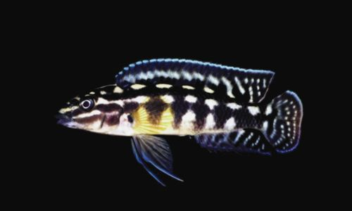 Julidochromis marlieri, tiago do vale